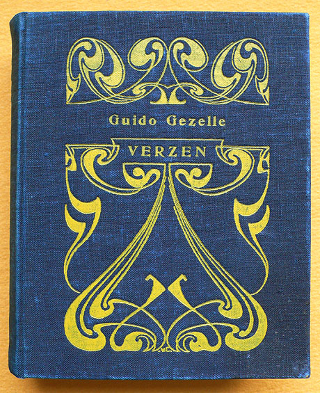 Boekomslag: Verzen van Guido Gezelle. 1e druk 1901. Auteur: G. Gezelle. Bandontwerp: G. van Caspel. Uitgeverij: L.J. Veen